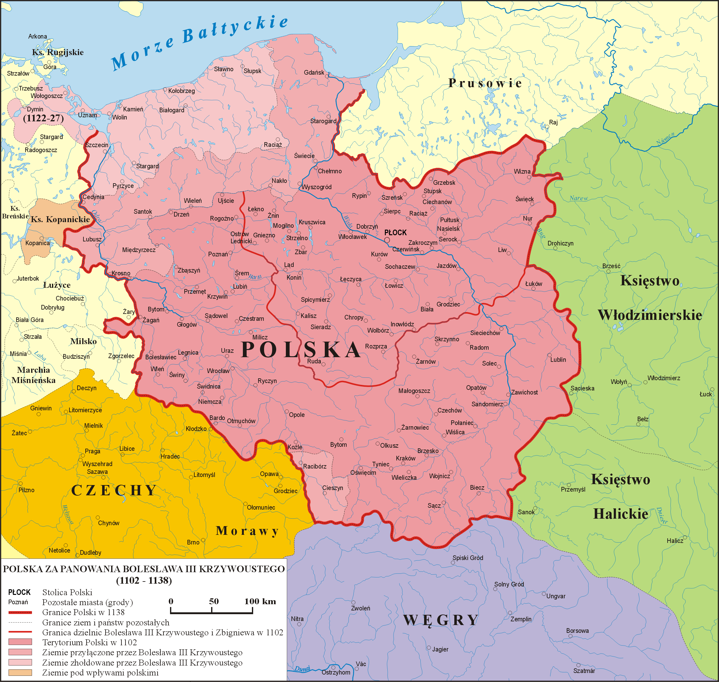 Mapa Polski za panowania Bolesława III Krzywoustego (1102 - 1138)